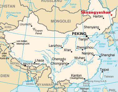 Lage von Shuangyashan